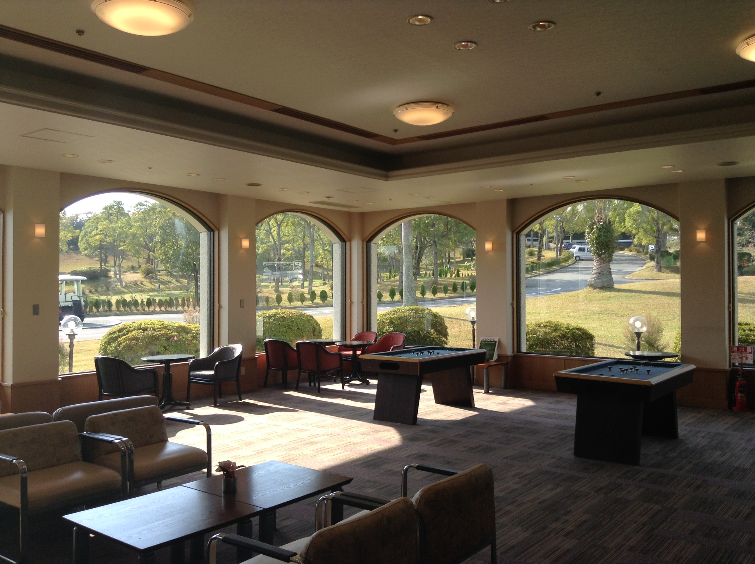 Hamajimacho Hazako, Shima, Mie Prefecture 517-0403, Japan